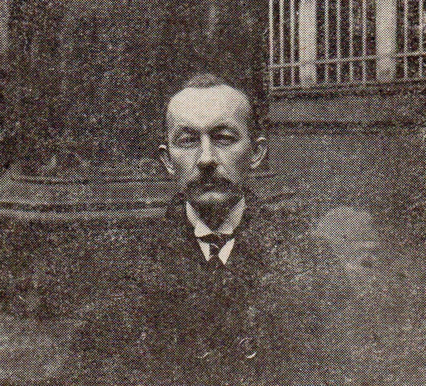 Józef Kostrzewski w Poznaniu, pod pomnikiem Adama Mickiewicza na Świętym Marcinie w 1924r.